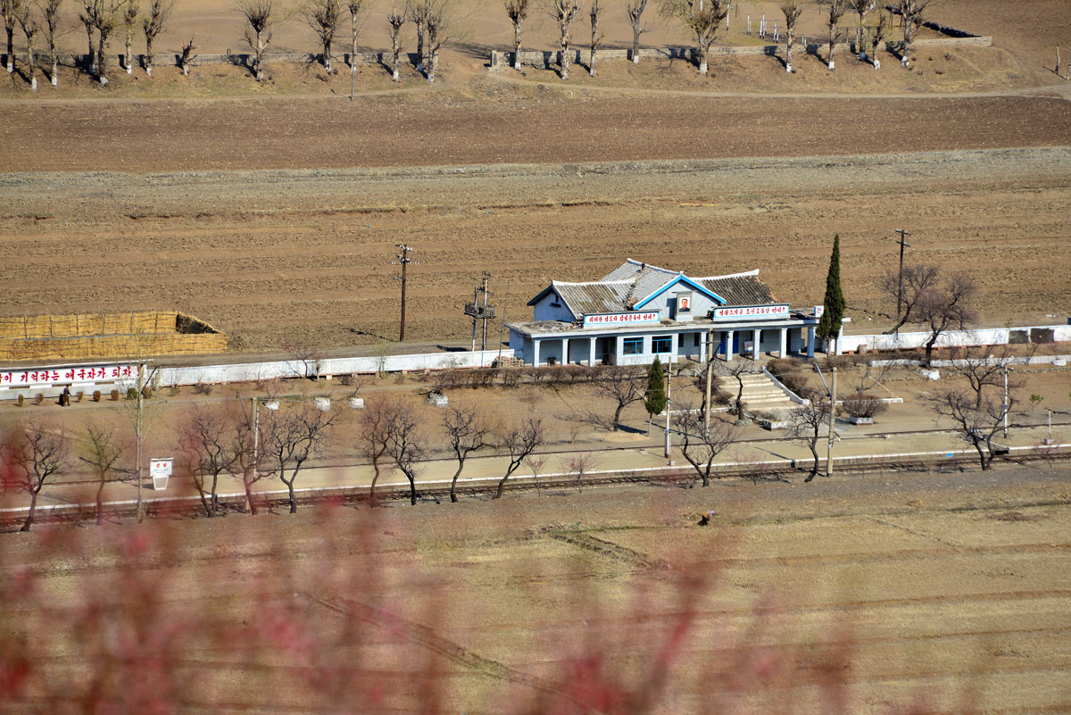 咸镜北道间坪站